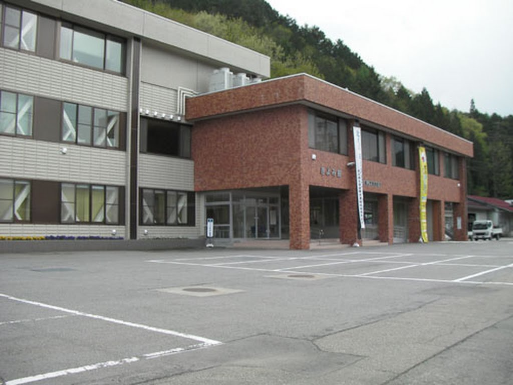 高山市図書館清見分館。